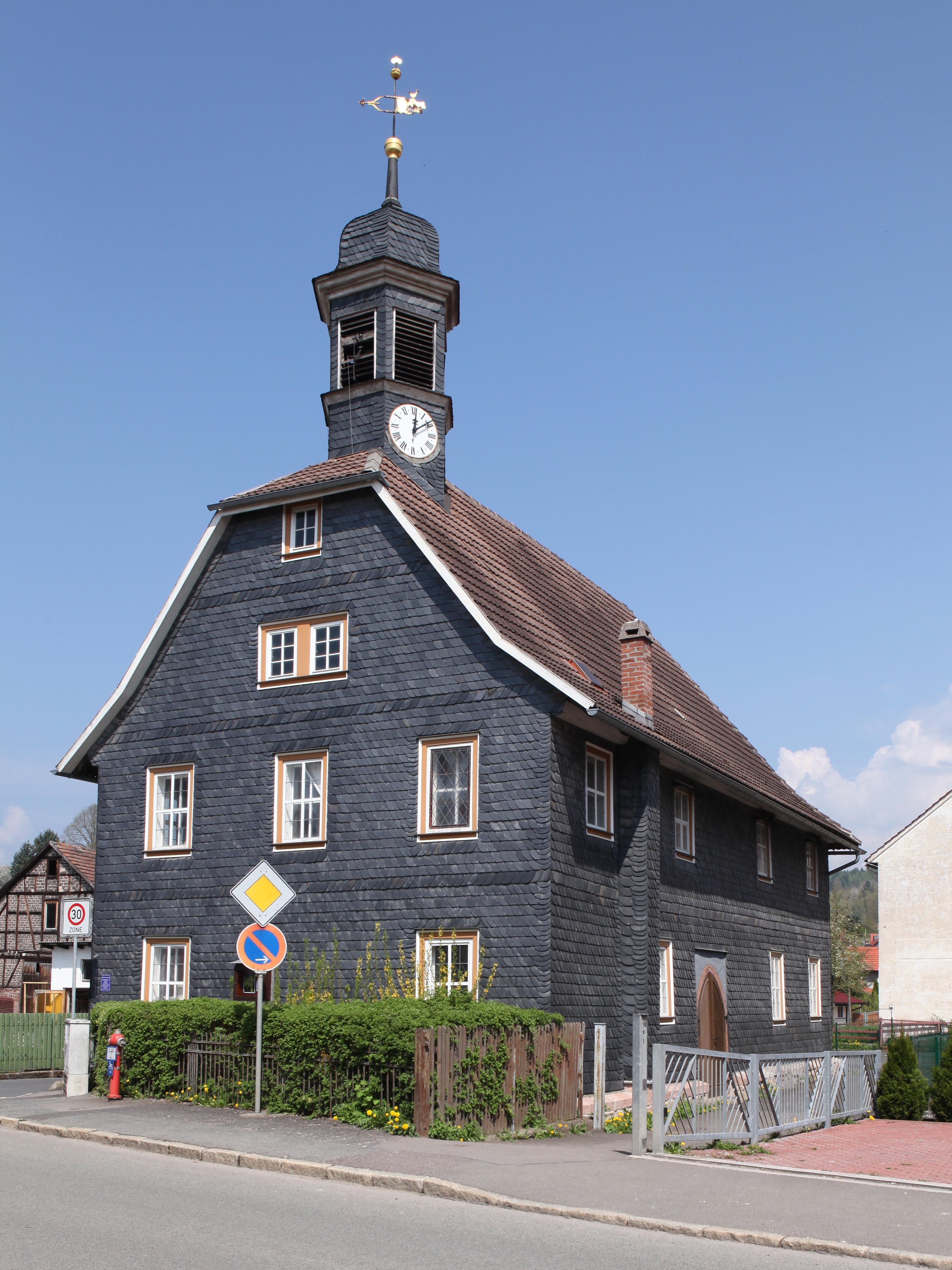 Kirche St. Johannes. Erste Kirche 1634 zerstört, 1681-84 Neubau in Fachwerk, Umbau 1717, kunstvolle barocke Ausstattung. Dietzhausen, Ot von Suhl